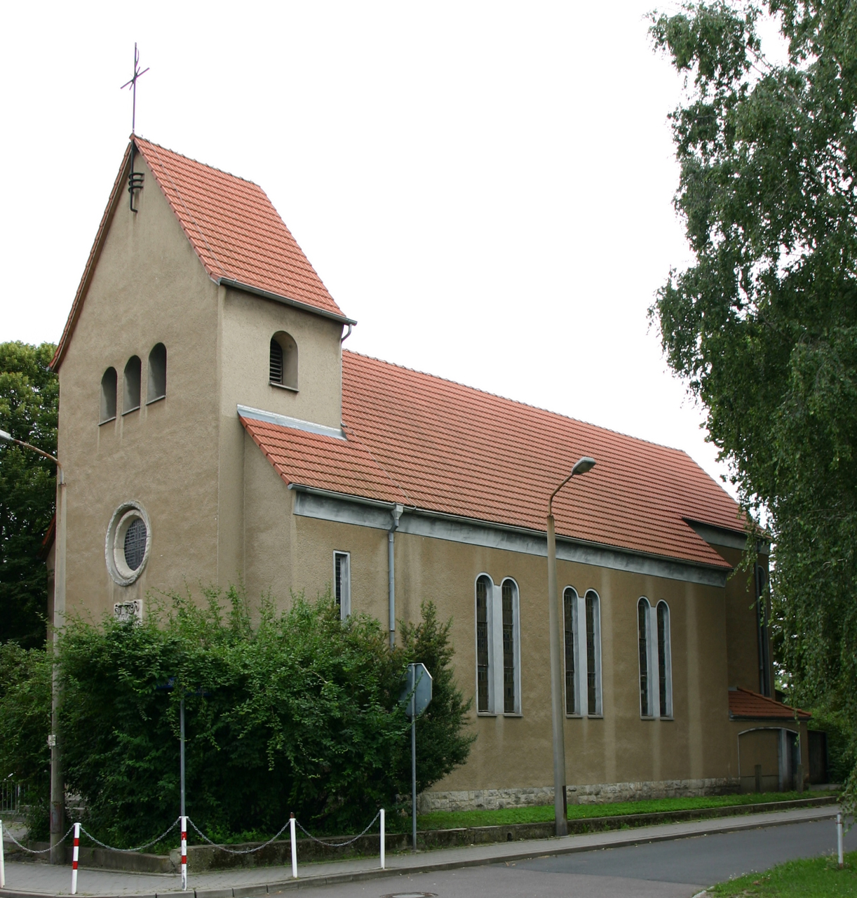 Großkayna ist ein Ortsteil von Braunsbedra im Saalekreis in Sachsen-Anhalt, Deutschland.